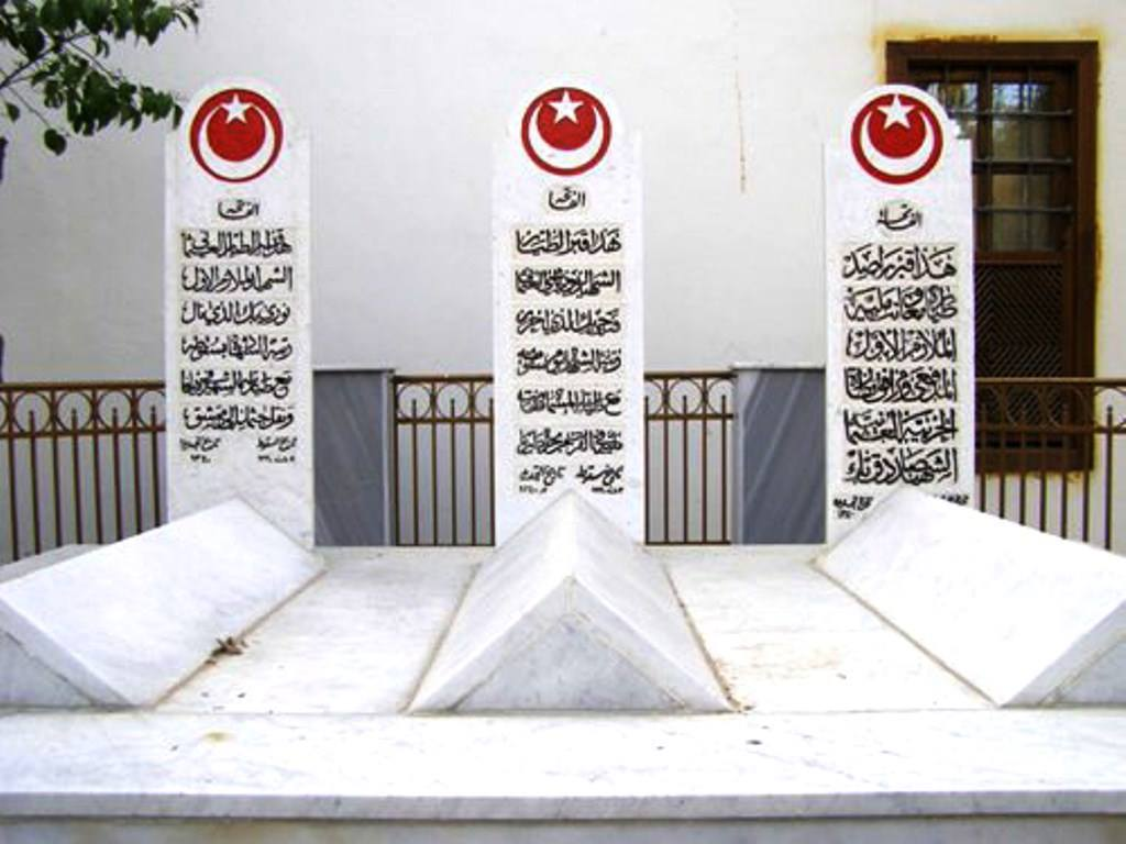 المدفن الذي يحوي قبور الطيارين العثمانيين عند ضريح صلاح الدين